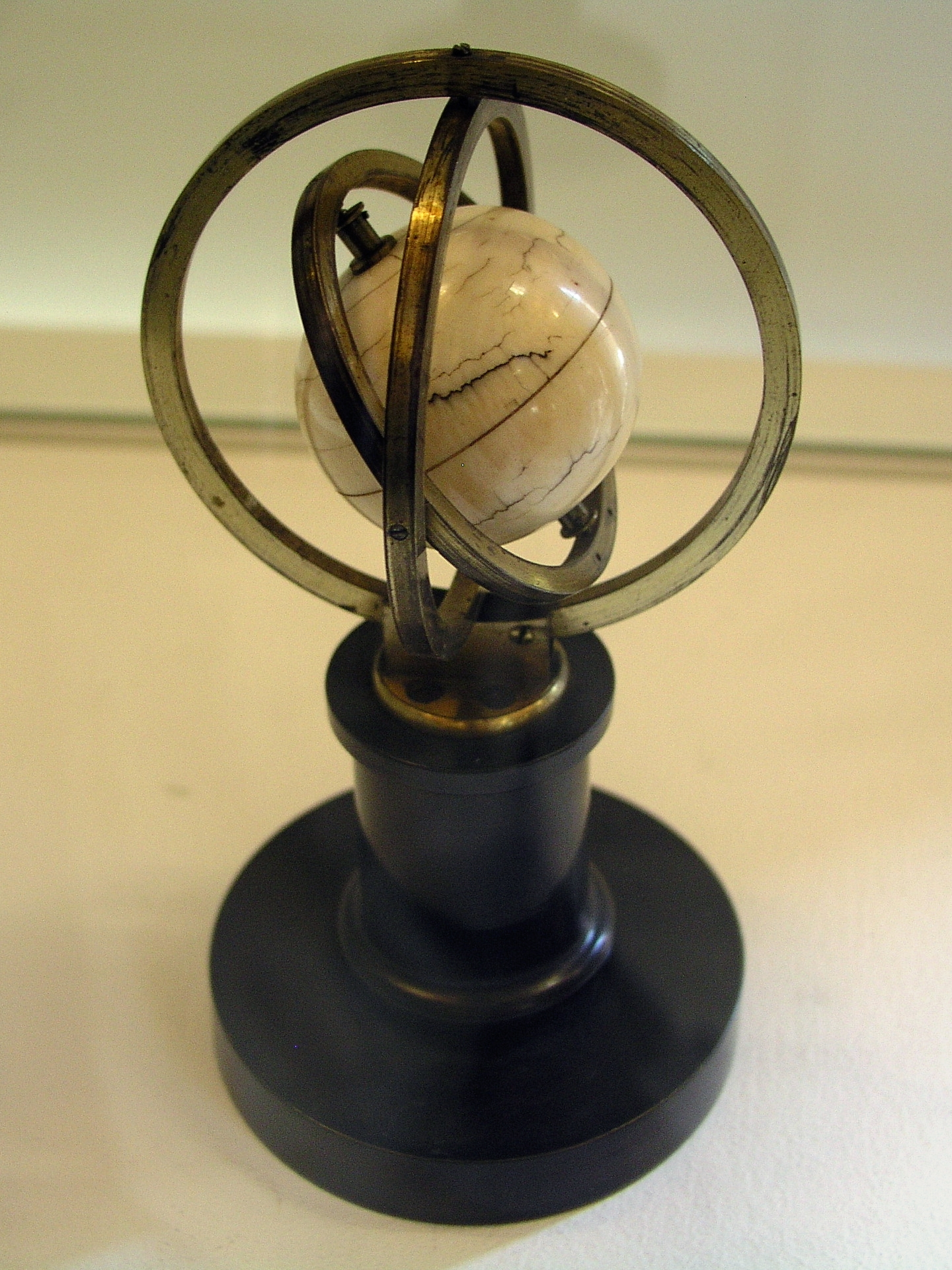 Das Original-Gyroskop von Prof. Bohnenberger aus dem Tübinger Stadtmuseum.